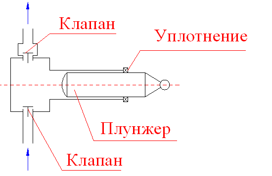 Поршень